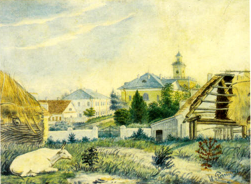 Description акварель "Вид на школу топографов в Чугуеве"Date between 1854 and 1857 date QS:P,+1854-00-00T00:00:00Z/8,P1319,+1854-00-00T00:00:00Z/9,P1326,+1857-00-00T00:00:00Z/9Source Государственная Третьяковская галереяAuthor Репин Илья Ефимович акварель "Вид на школу топографов в Чугуеве"